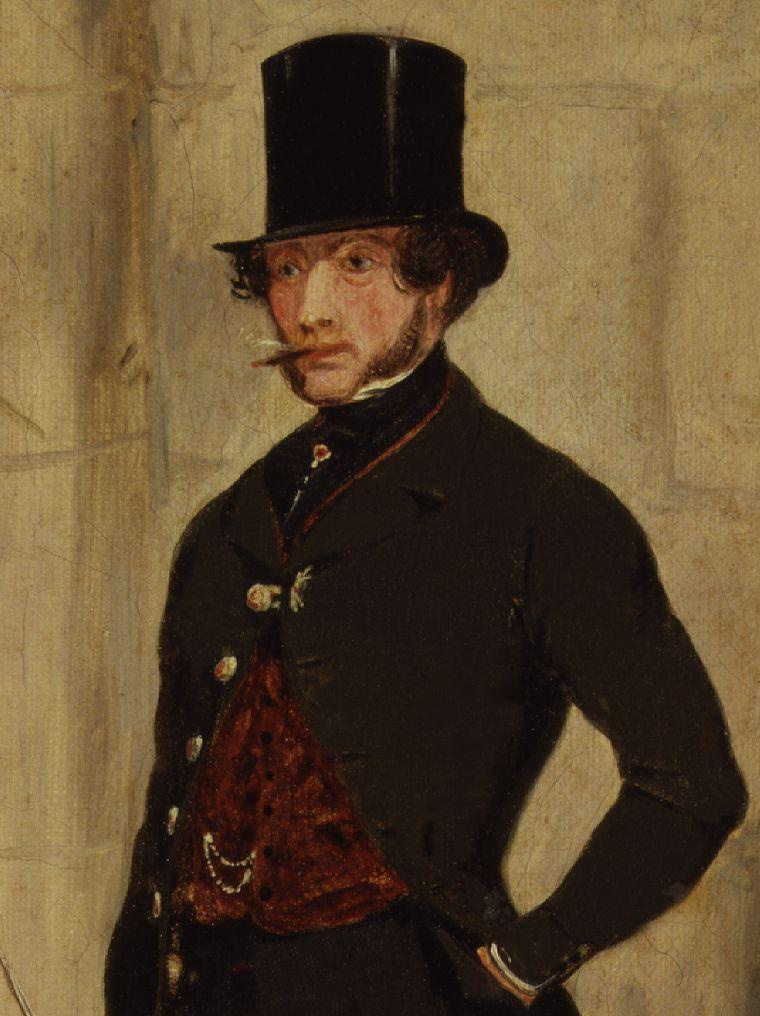 detail